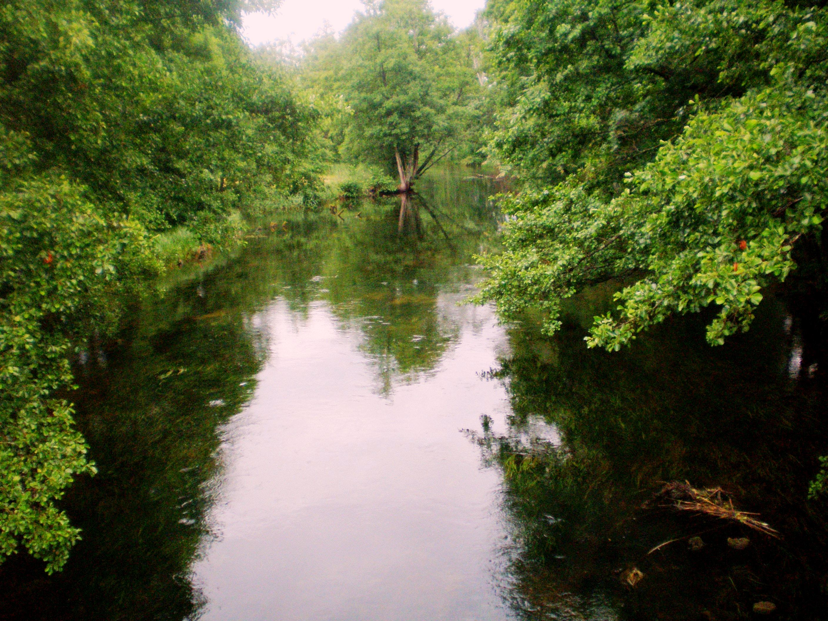 Žeimena river in Kaltanėnai, Lithuania